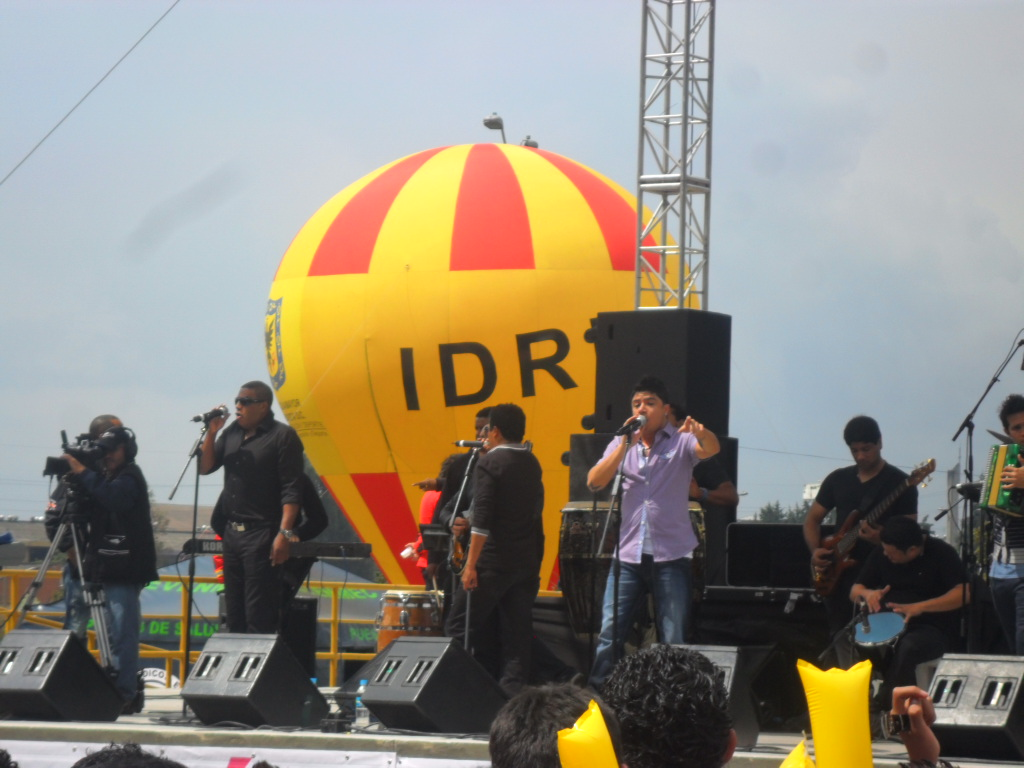 Danie